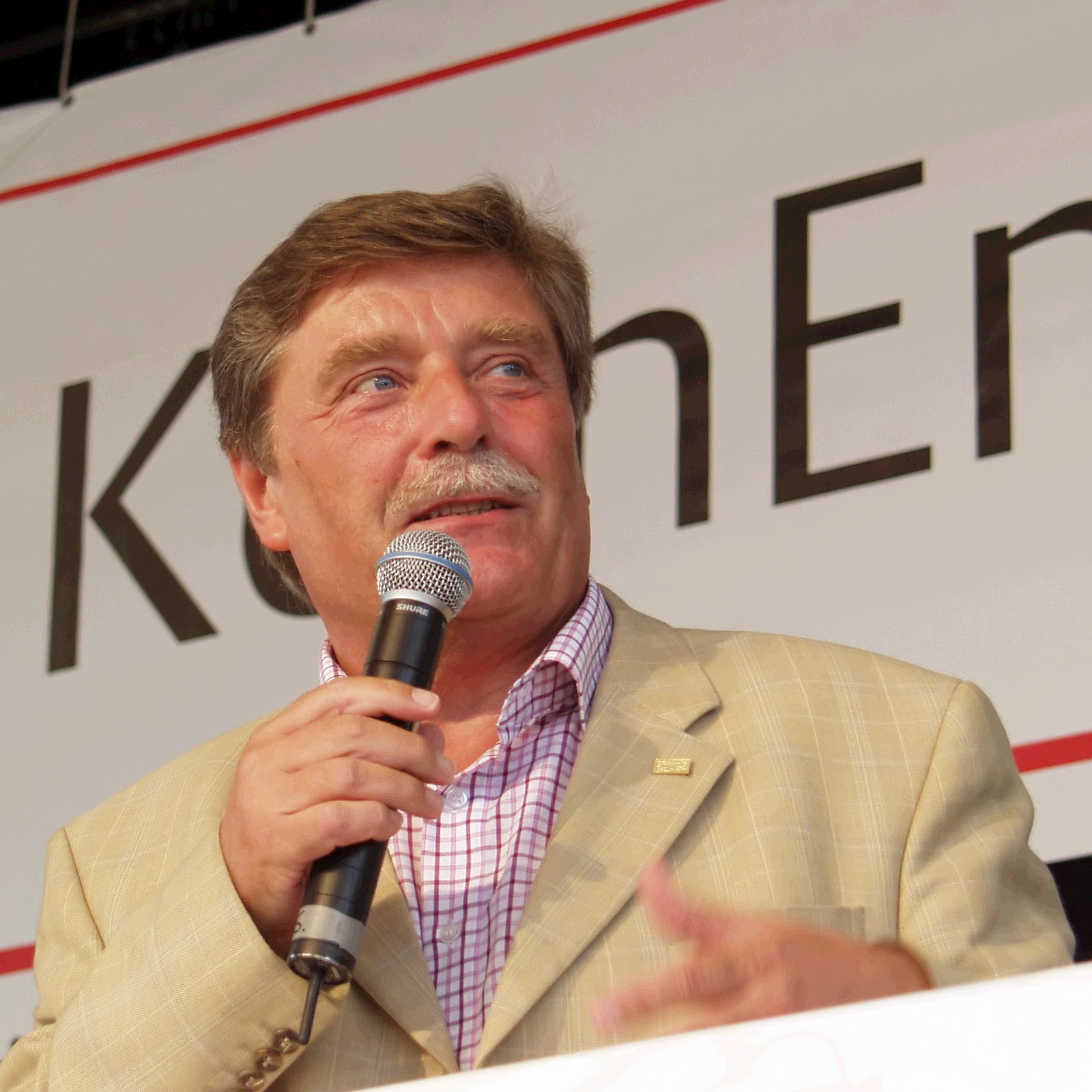 Fritz Schramma, Oberbürgermeister von Köln, hält die Laudatio für einen Preisträger von „KölnEngagiert“ am Kölner Ehrenamtstag. Veranstaltungsort: Tanzbrunnen neben den Rheinhallen, Köln-Deutz.